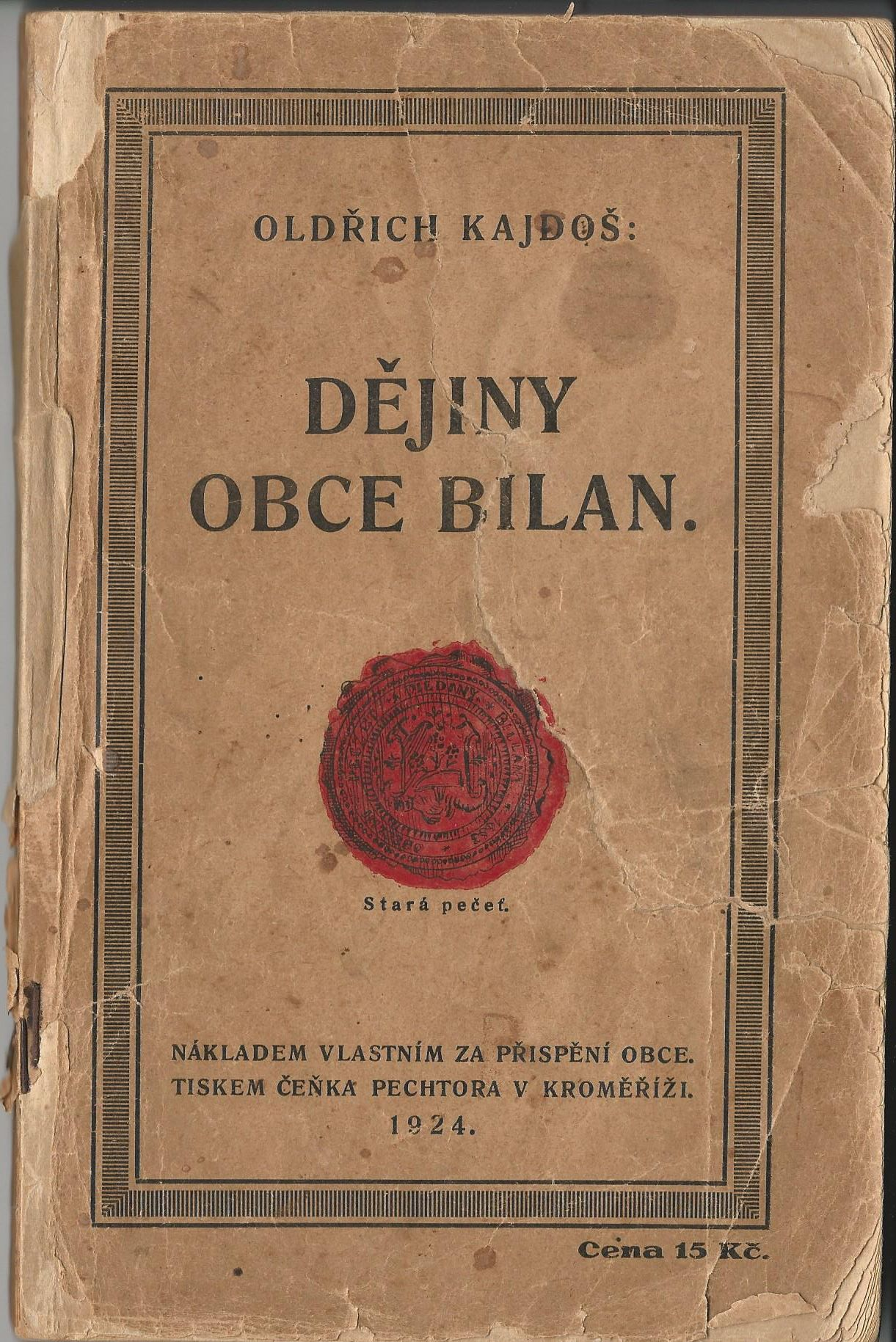 Obálka knihy Dějiny obce Bilan (1924). Autor Oldřich Kajdoš